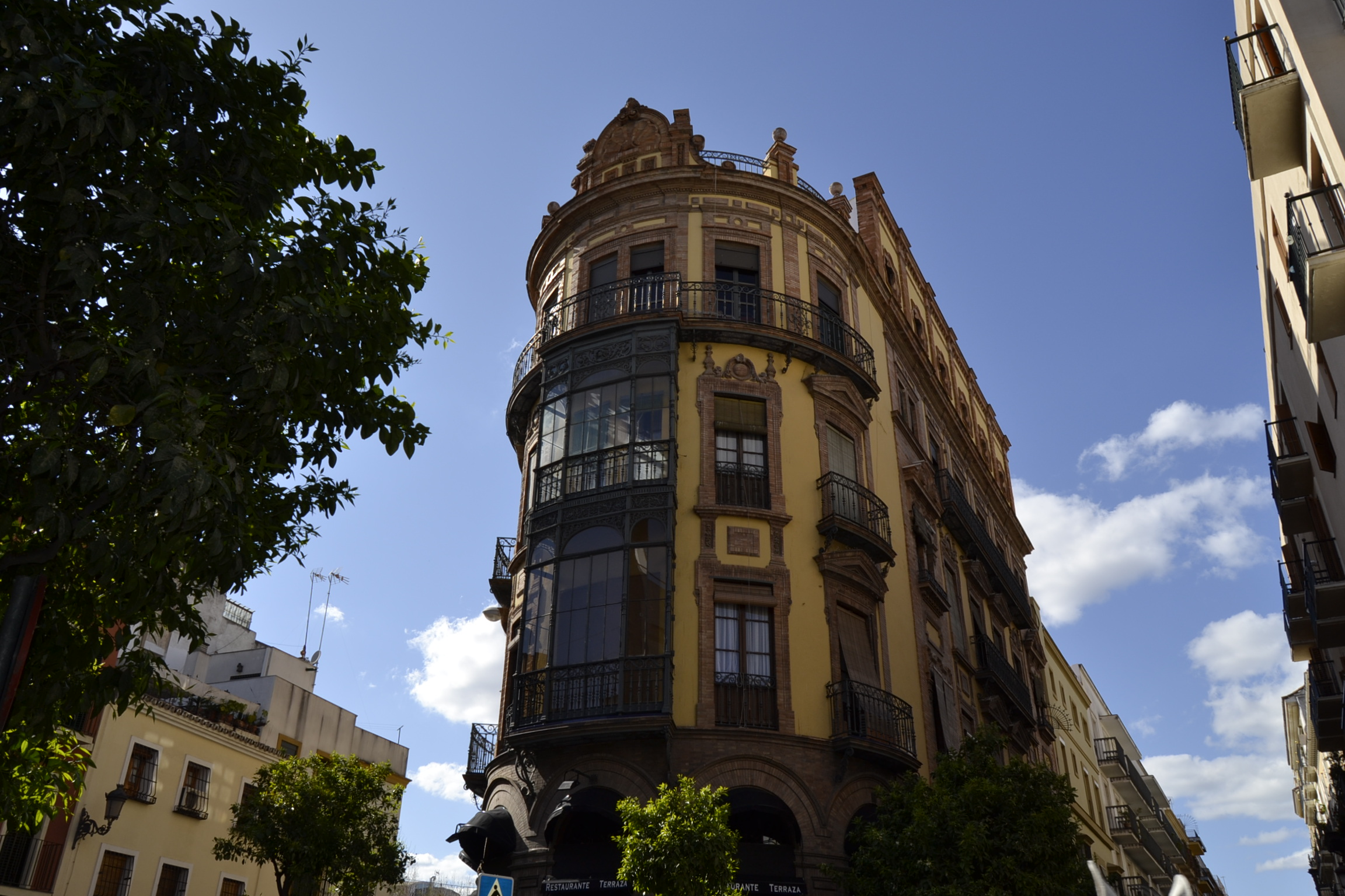 Edificio en El Arenal. Marzo de 2012